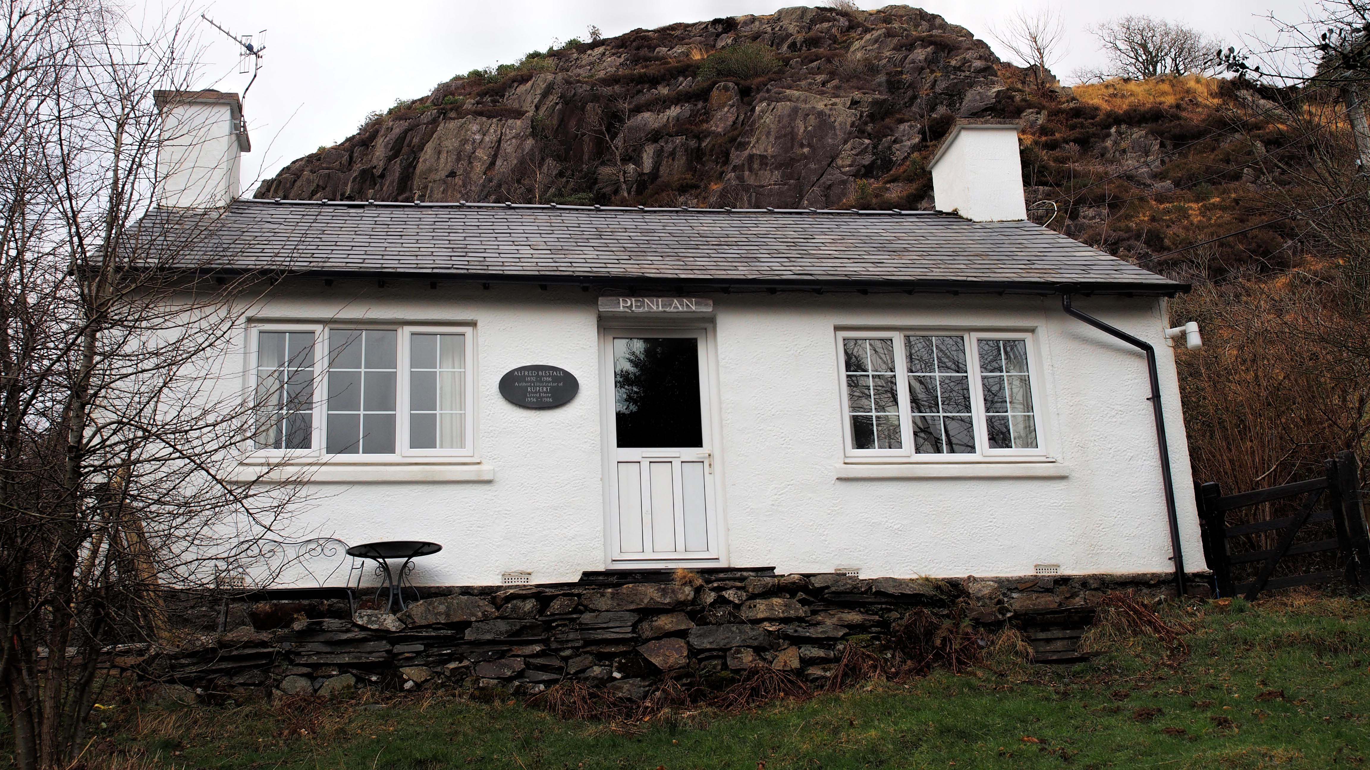 Bwthyn o Alfred Bestall ym Beddgelert